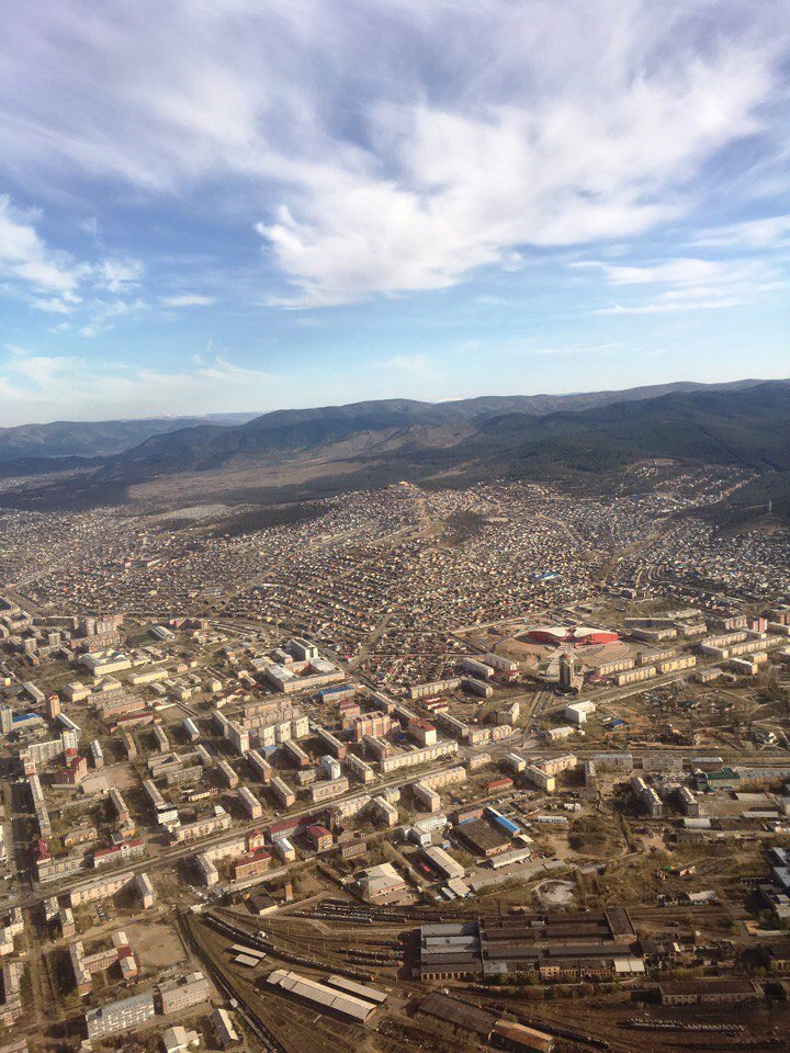 The Railway district of the city of Ulan-Ude from a bird's eye view